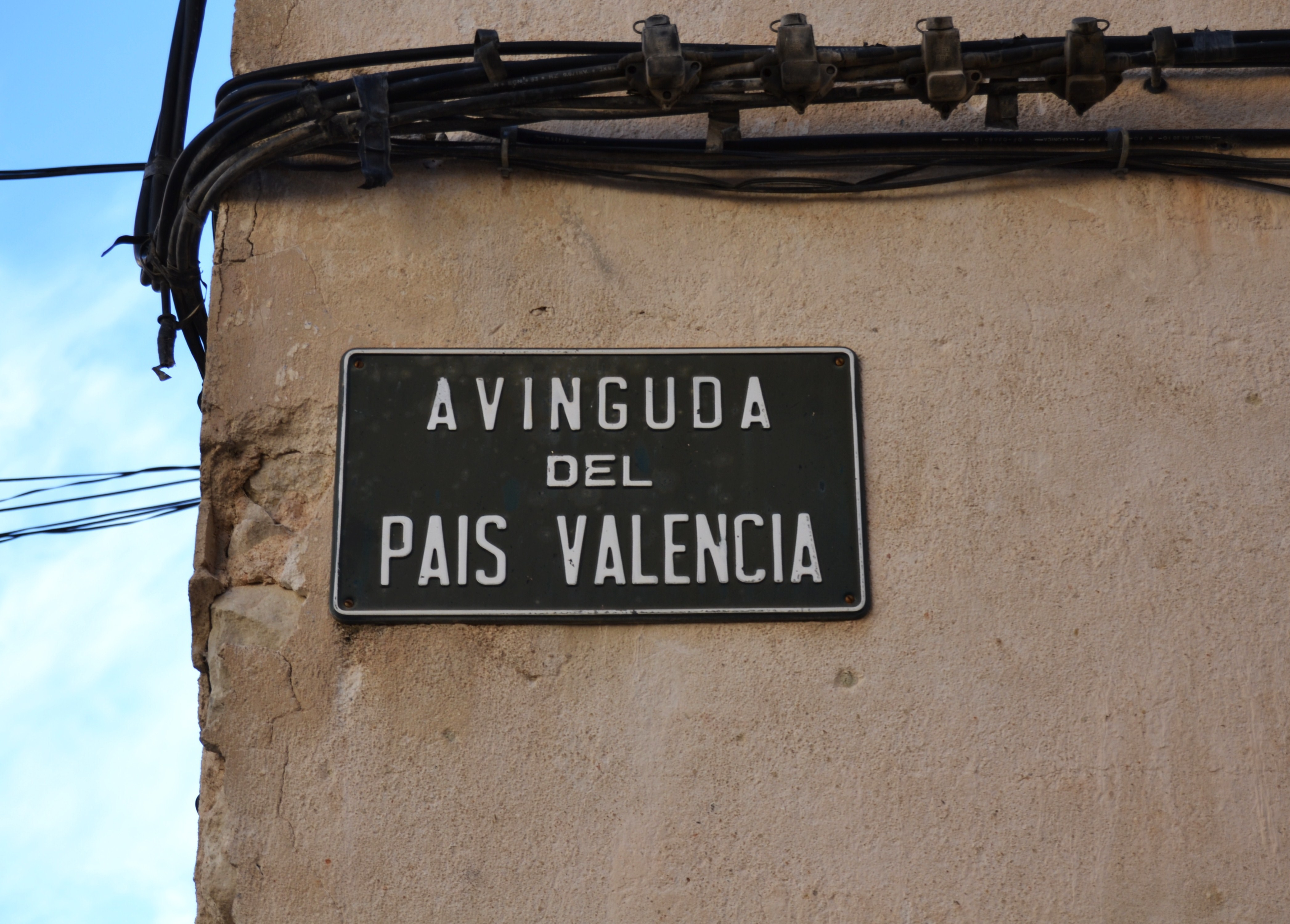 Quatretondeta, avinguda del País Valencià, placa.